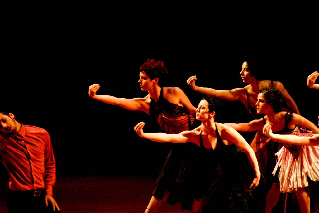 Espectáculo "Cruel" da Cia de Dança Deborah Colker